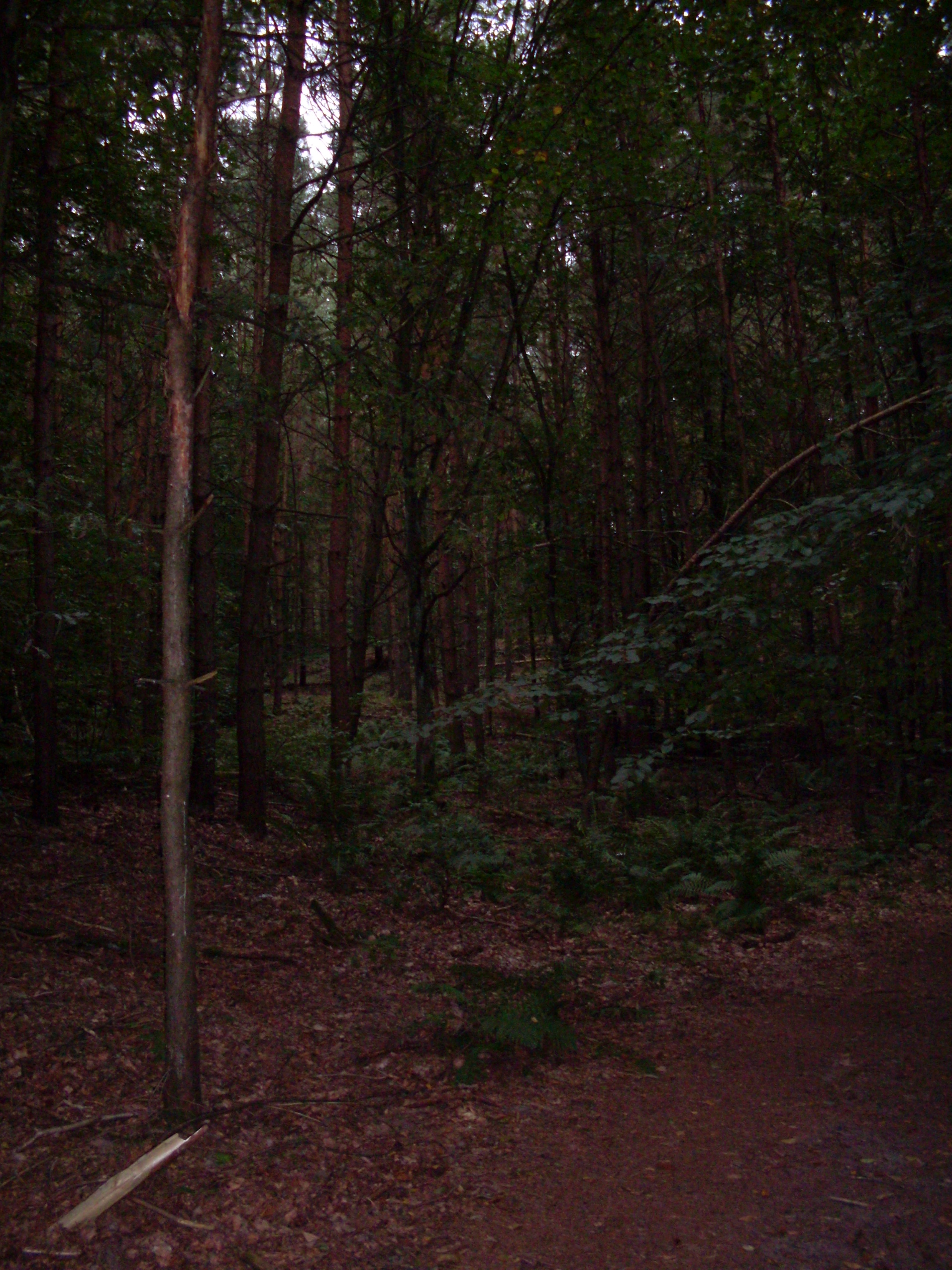 Puszcza Wkrzańska w okolicy Leśna Starego